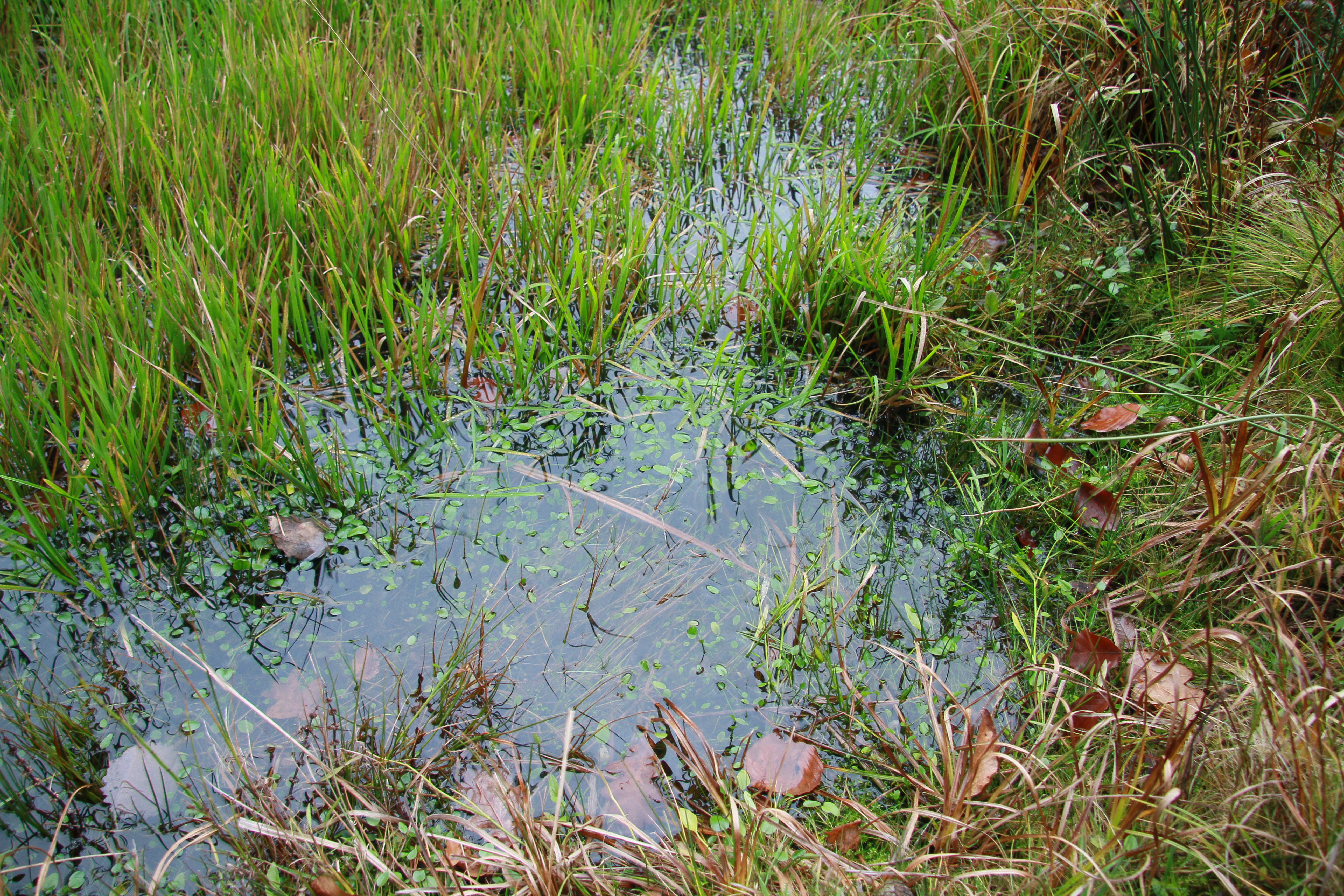 Detail vegetace uměle vytvořené tůně